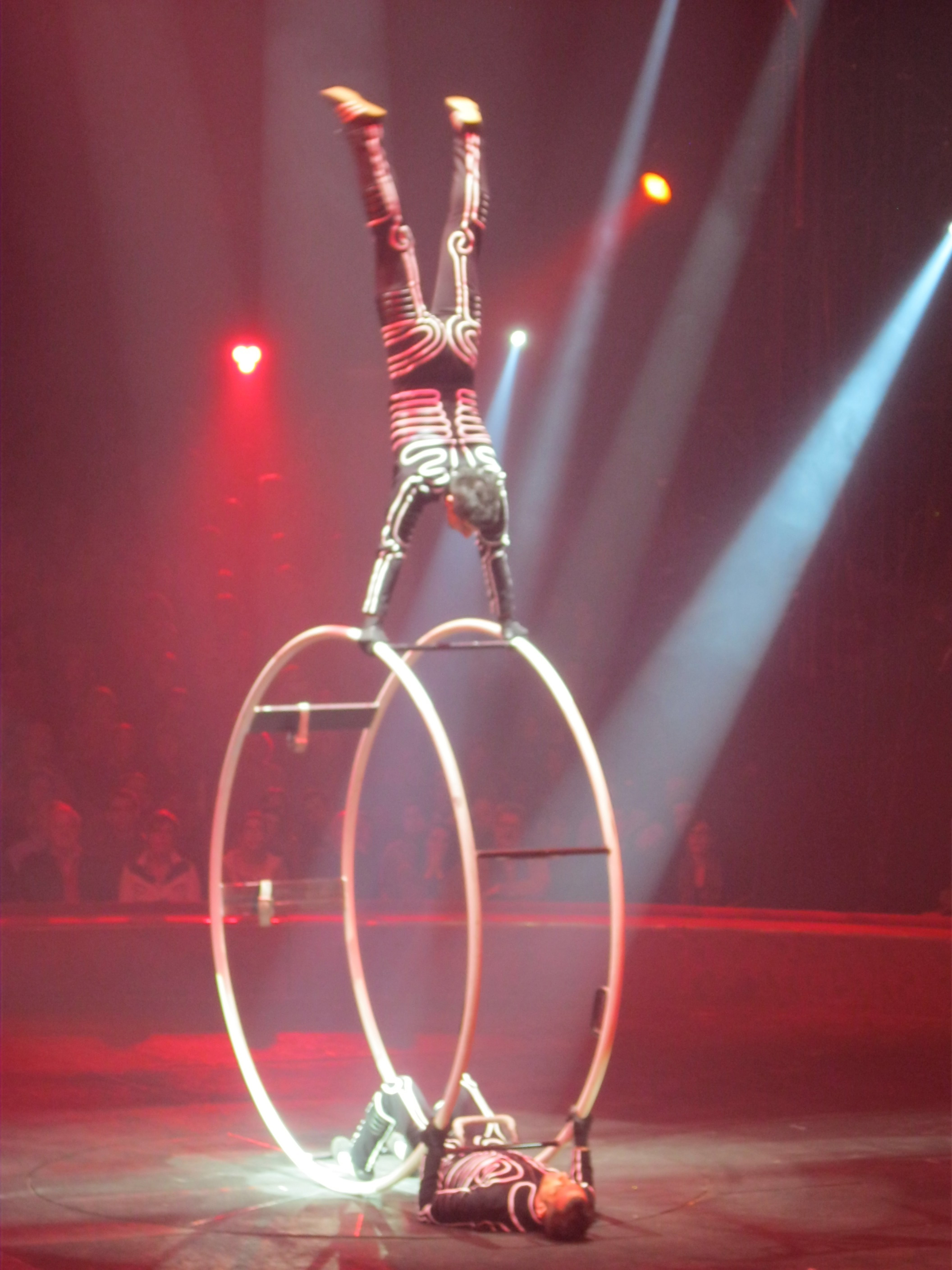 Numéro de roue allemande au cirque Arlette Gruss à Bordeaux en janvier 2013.